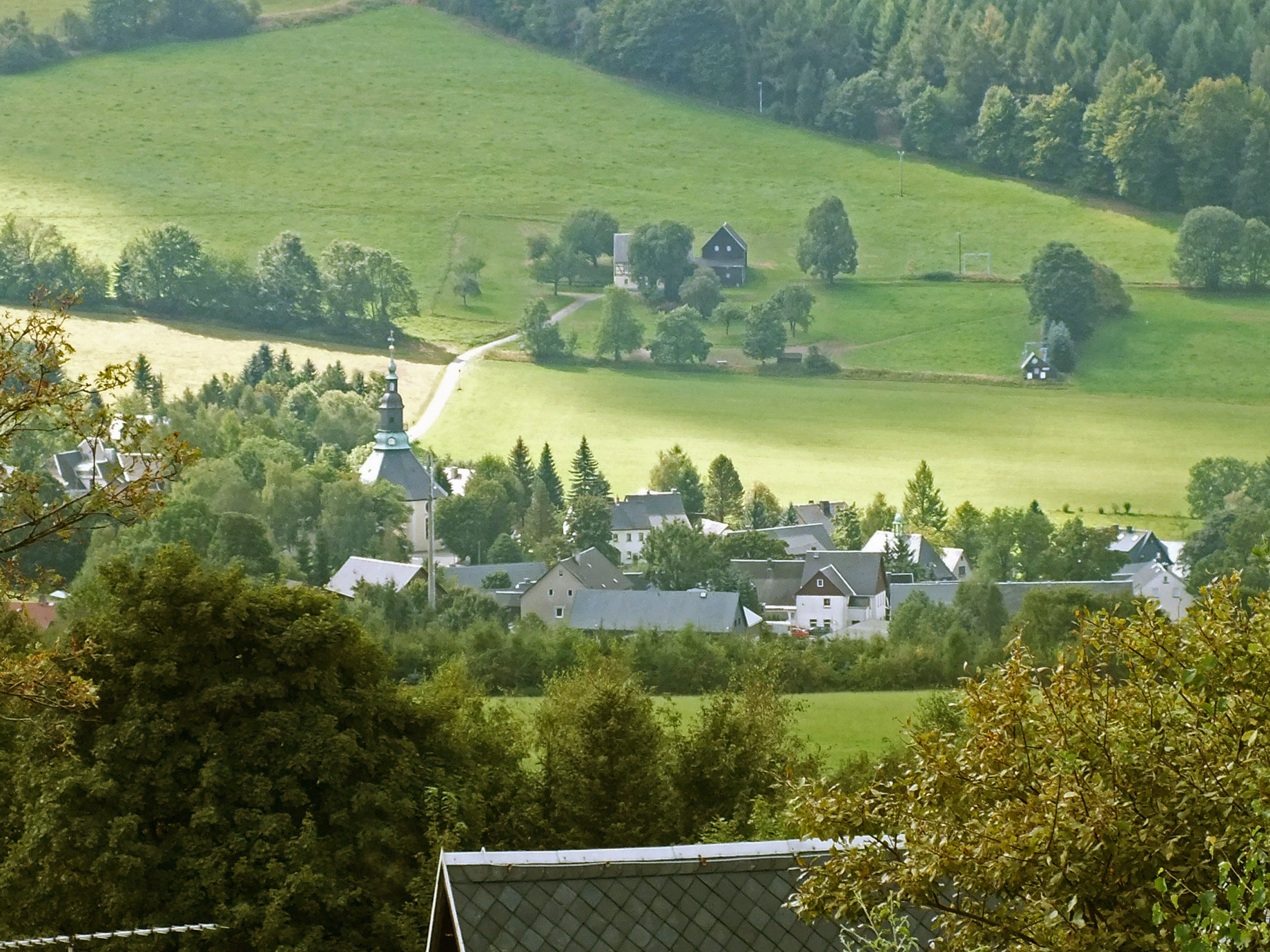 Seiffen vom Schwartenberg gesehen